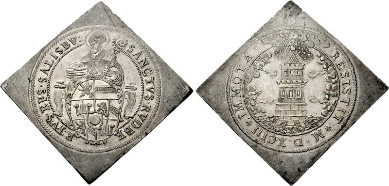 ÖSTERREICH, Salzburg. Wolf Dietrich von Raitenau. Erzbischof, 1587-1612. AR Turmtaler Klippe (28,63 g, 12H). Datiert 1593. SANCTVS • RVDBE RTVS • EPS • SALISBV:, St. Rudbert, mit bischöflichen Regalia, sitzend nach oben, leicht links, salzkellerund crozier; bischöfliches Wappen vor; alle innerhalb pelletiert erlegener und genarbter linker Grenze / • RESISTIT + M • D : XCIII + IMMOTA •, dreistufiger Turm in Wellen gesetzt und von Kreuz überragt, von Winden an den Seiten und Hagel und Regen von Gewitterwolken oben übergepeitigt; alle innerhalb pelletiert ergehenund gekörnt linken Grenze. Bernhart & Roll 1565; Probszt 805; Davenport 8200. Gute VF, ein paar Kratzer.